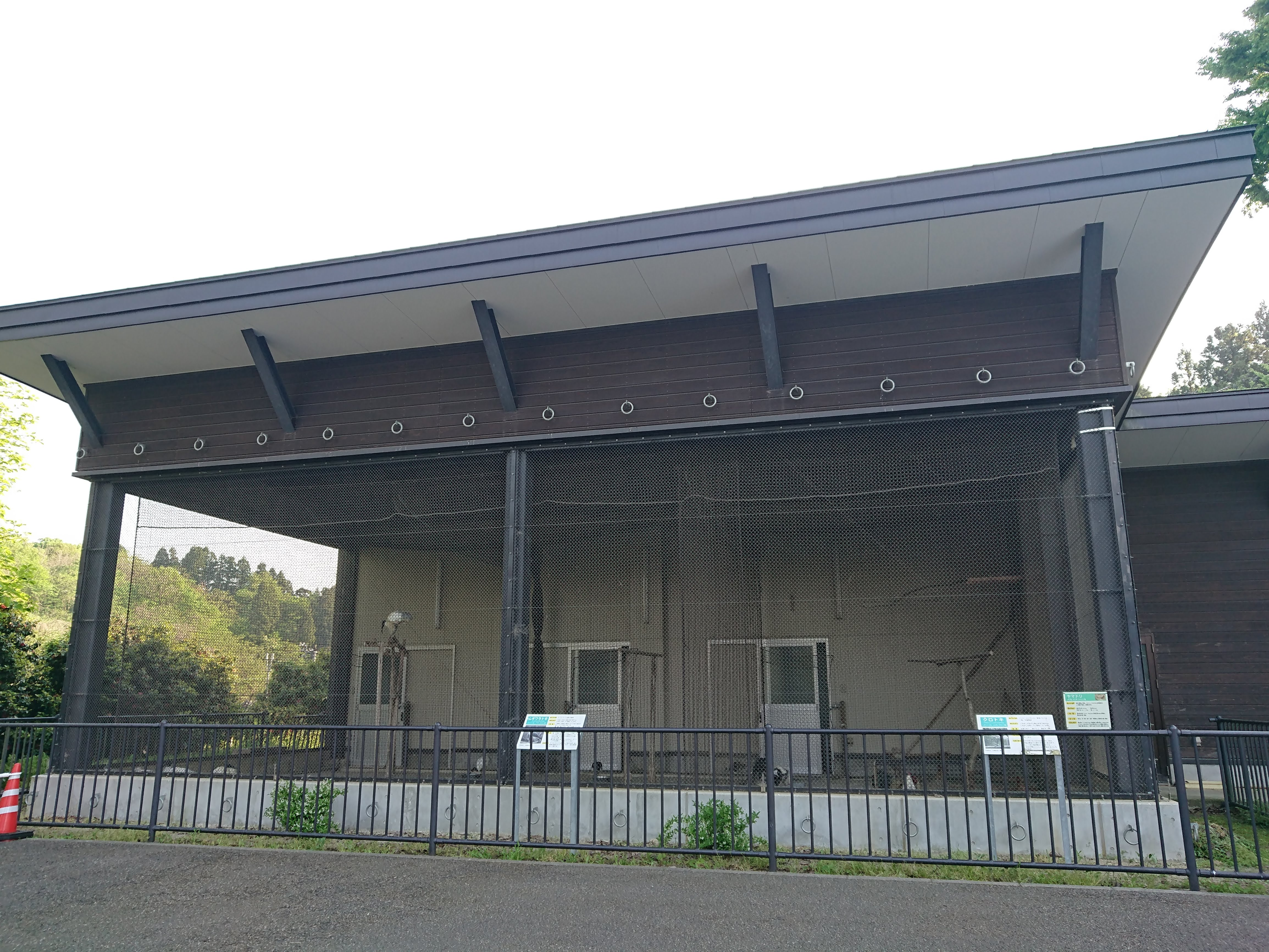 長岡市の悠久山小動物園 クロトキ飼育小屋